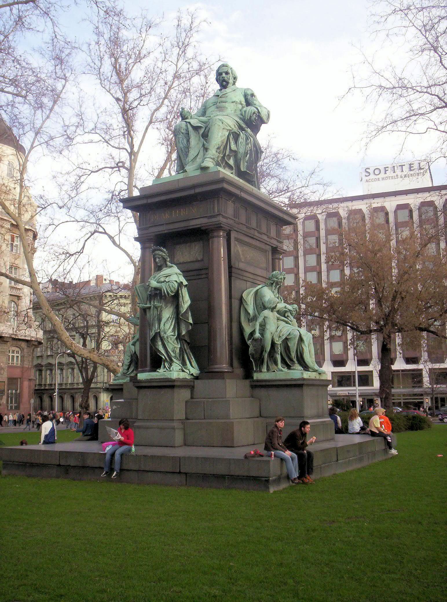 Deák Ferenc szobra Budapesten. Huszár Adolf, Keszler Adolf és Mayer Ede szobrászművészek, valamint Schickedanz Albert építész alkotása – photo taken by uploader User:Csanády in 2006.